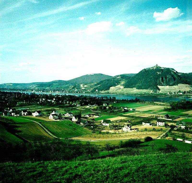 Blick vom Rodderberg auf das Siebengebirge